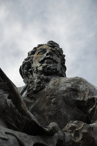 foto tomada en alburquerque